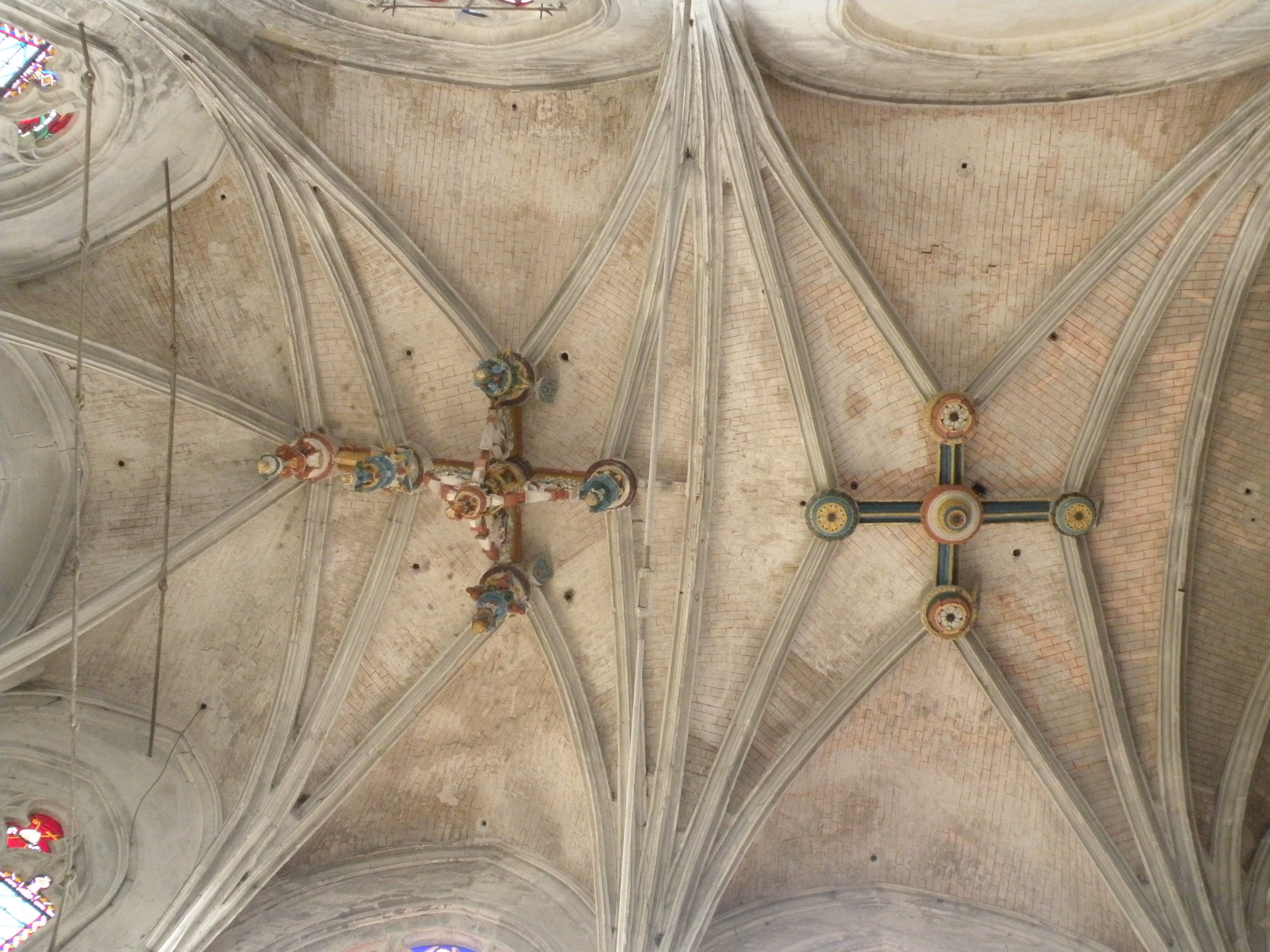 Église Saint-Denis de Sérifontaine voute